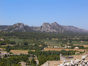 Die Alpilles von Osten.